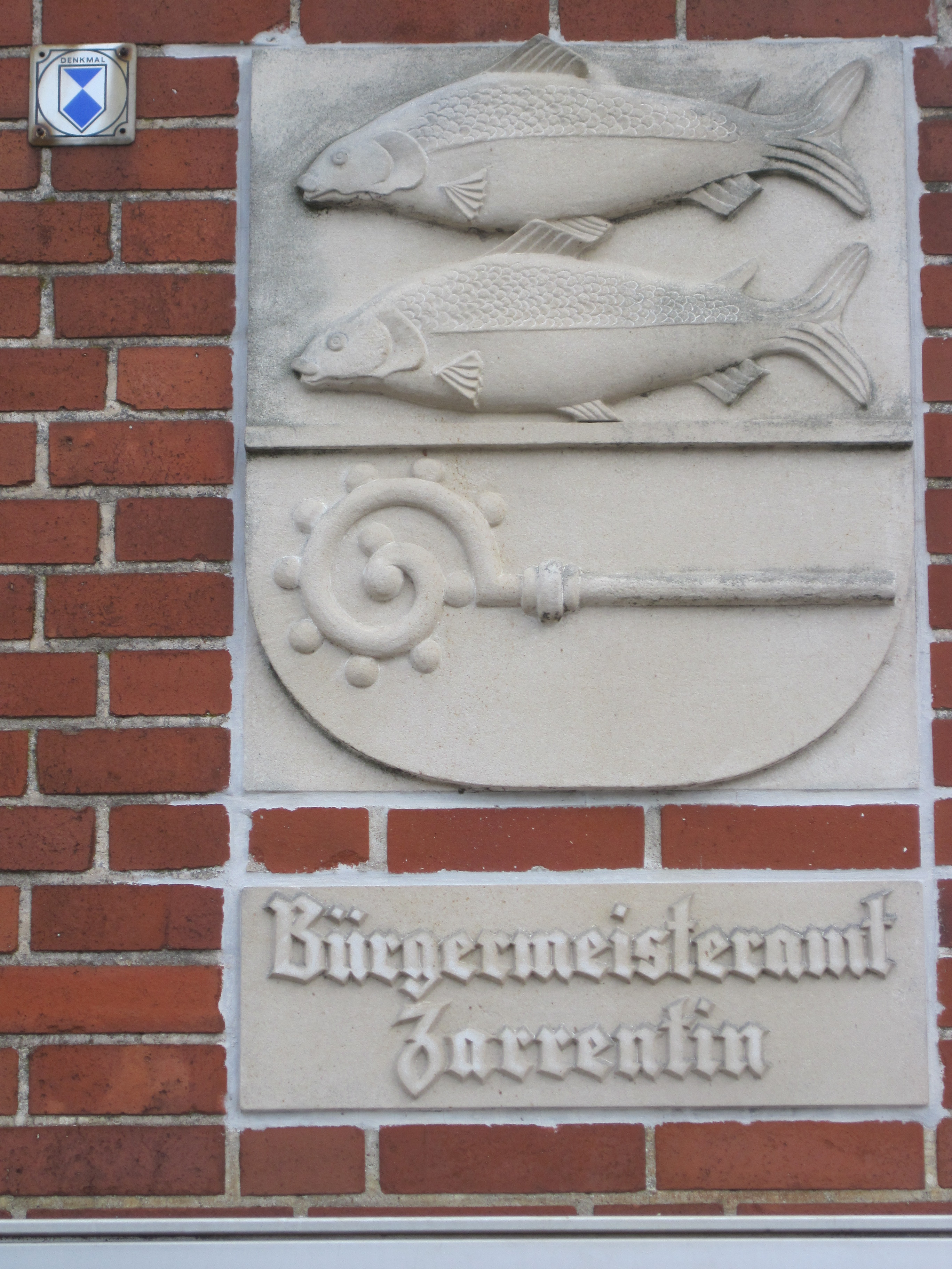 Wappen der Stadt Zarrentin am Schaalsee. Relief am Rathaus